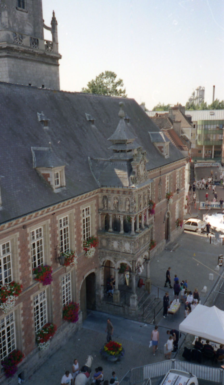 La facade de l'Hôtel de ville d'Hesdin